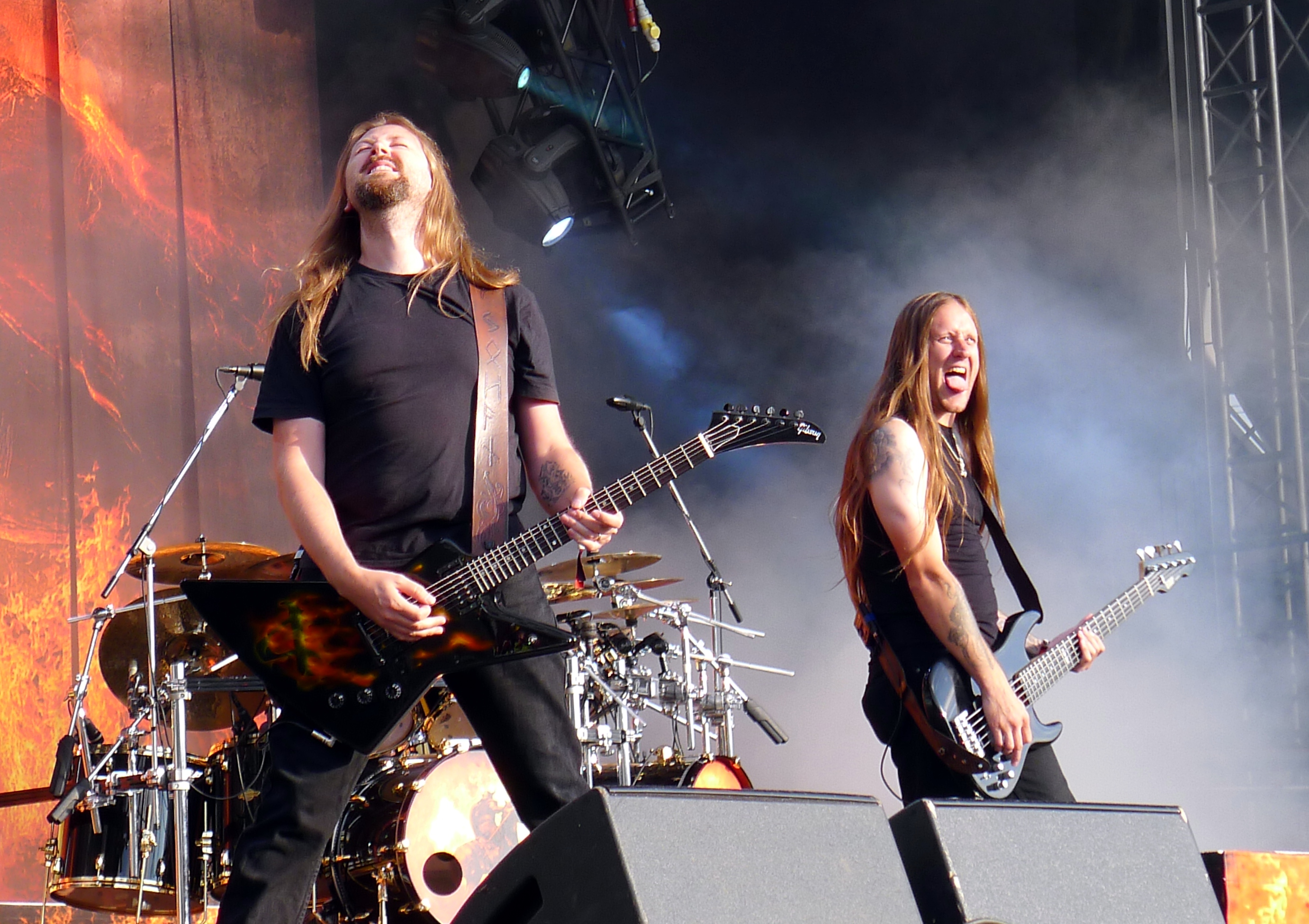 Amon Amarth live am Tuska Open Air 2011